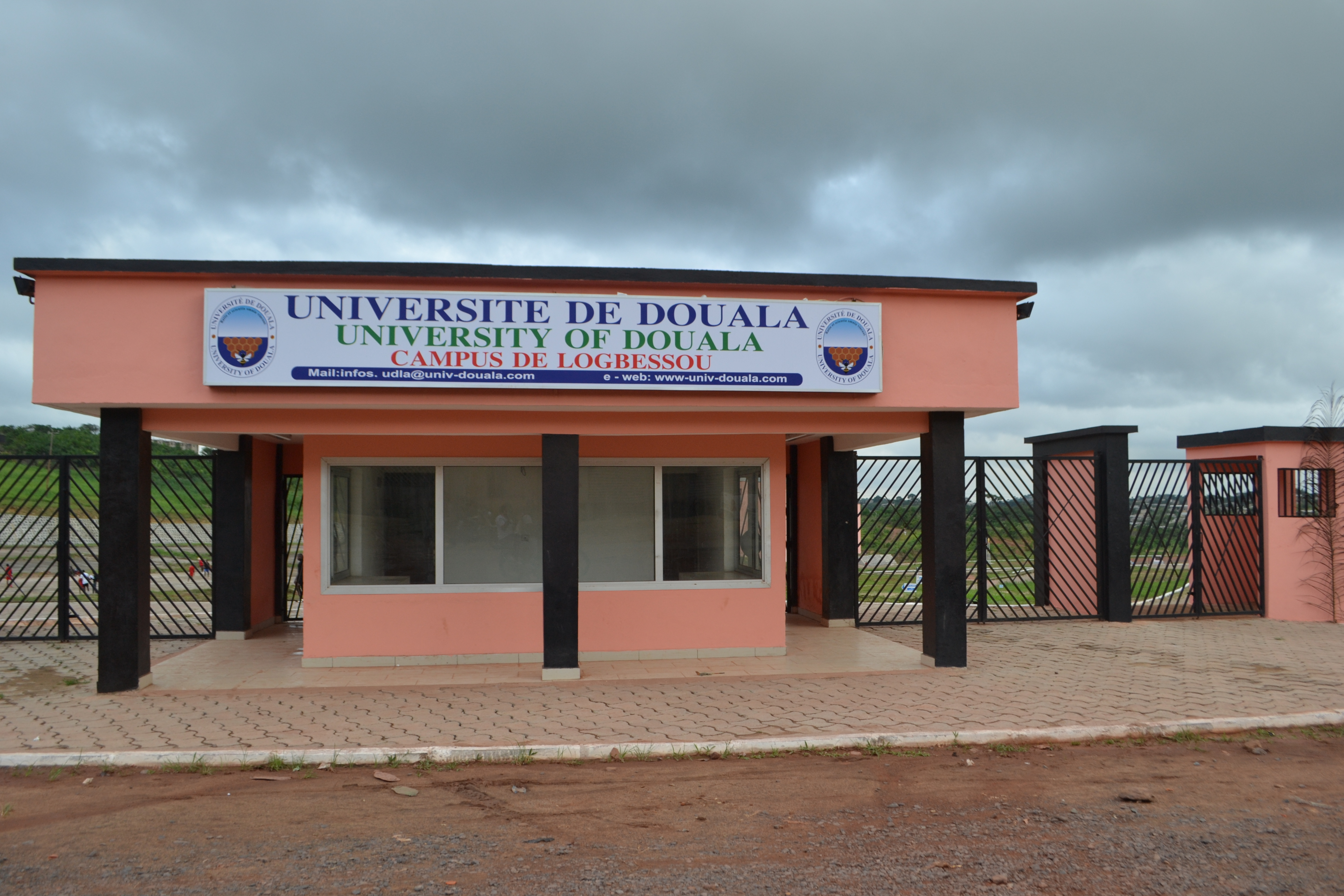 Université de Douala, Campus de Logbessou situé à PK 14.